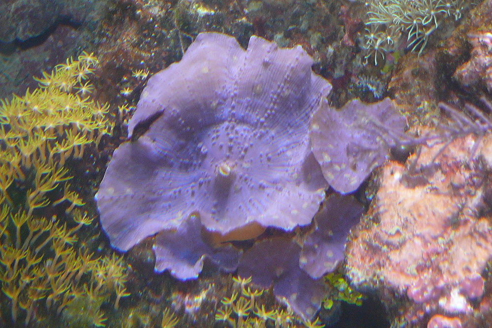 Corallimorpharia